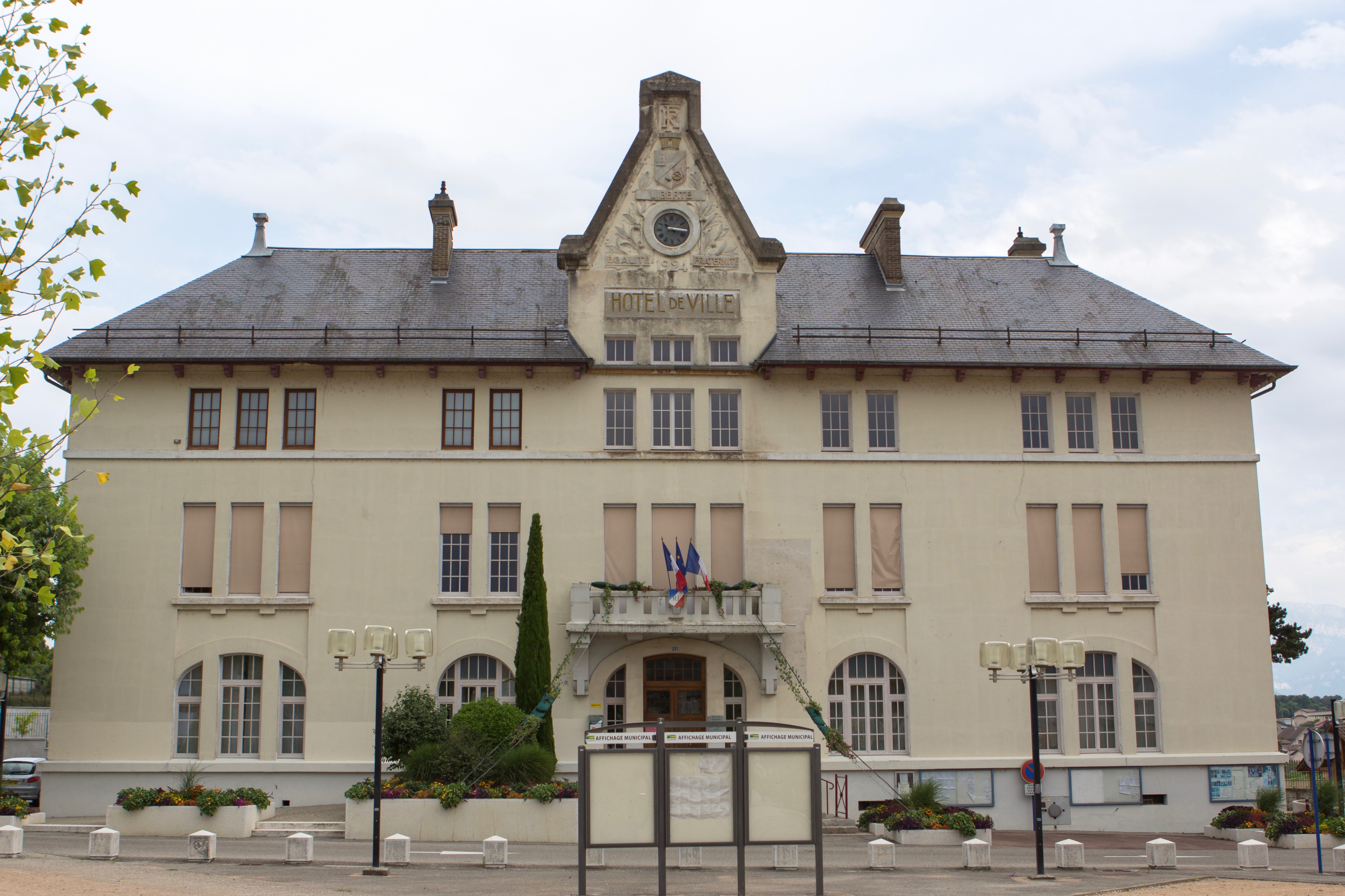 Mairie de Rives / Rives, Isère, France